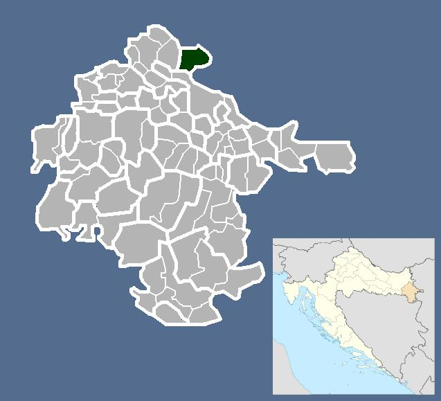 Српски (ћирилица): Општина Борово.